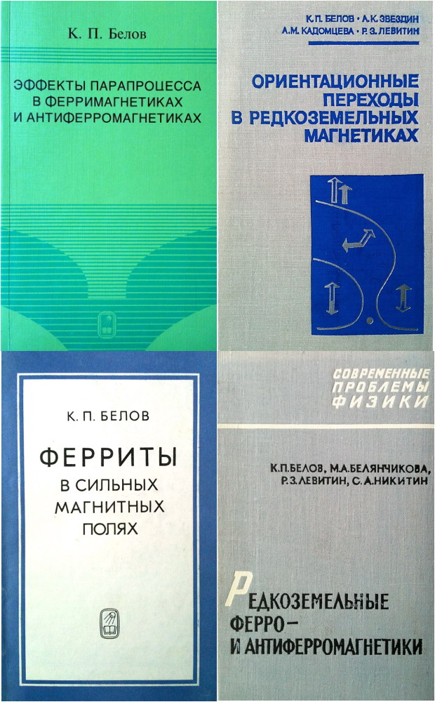 Книги К.П. Белова